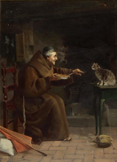 "Cappuccino che alimenta un gatto", olio su tela, 58,5 x 42,5 cm., firmato, collezione privata